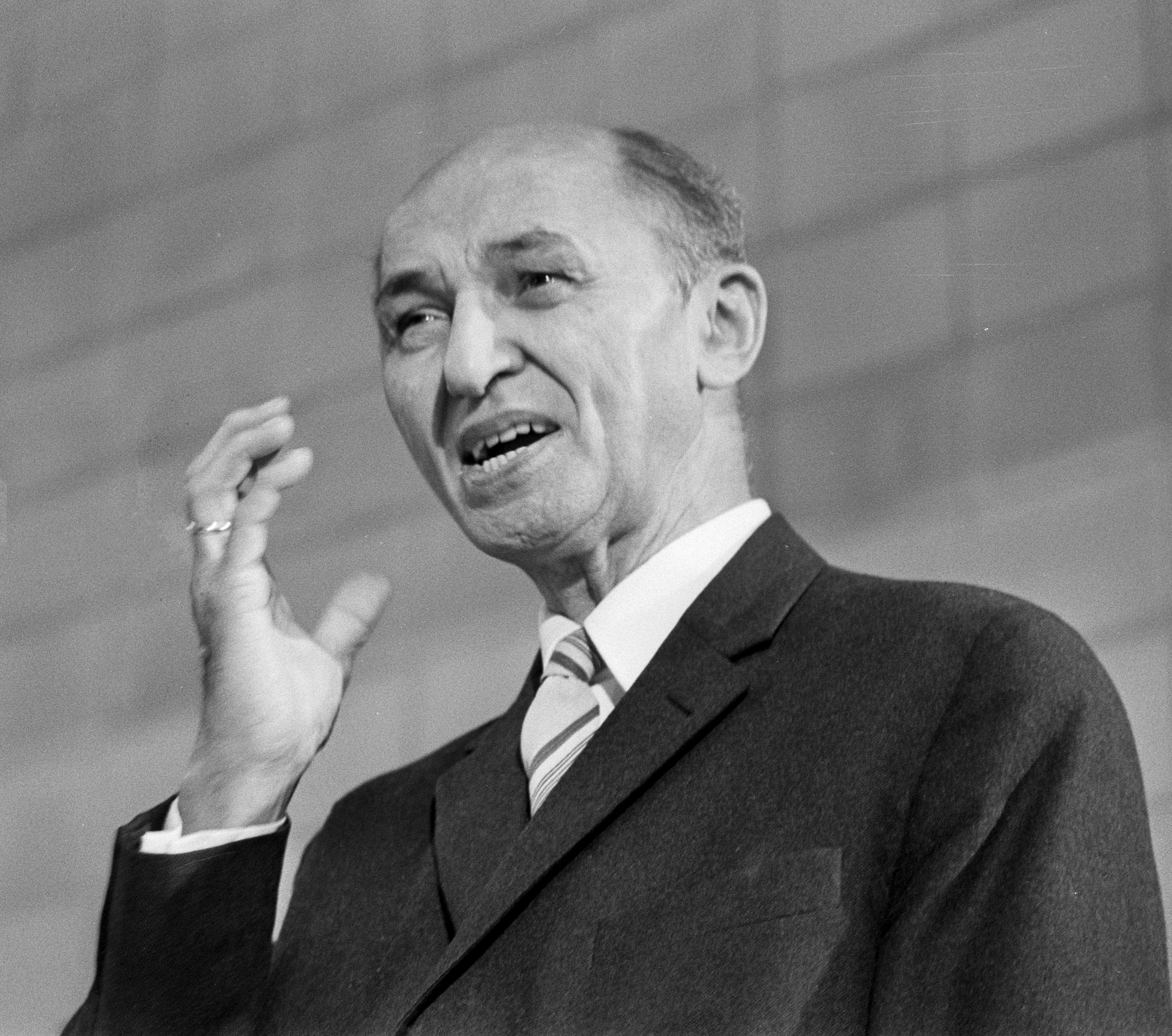 Congres Molukkers in Capelle aan den IJssel ; ir. Manusama spreekt congres toe.